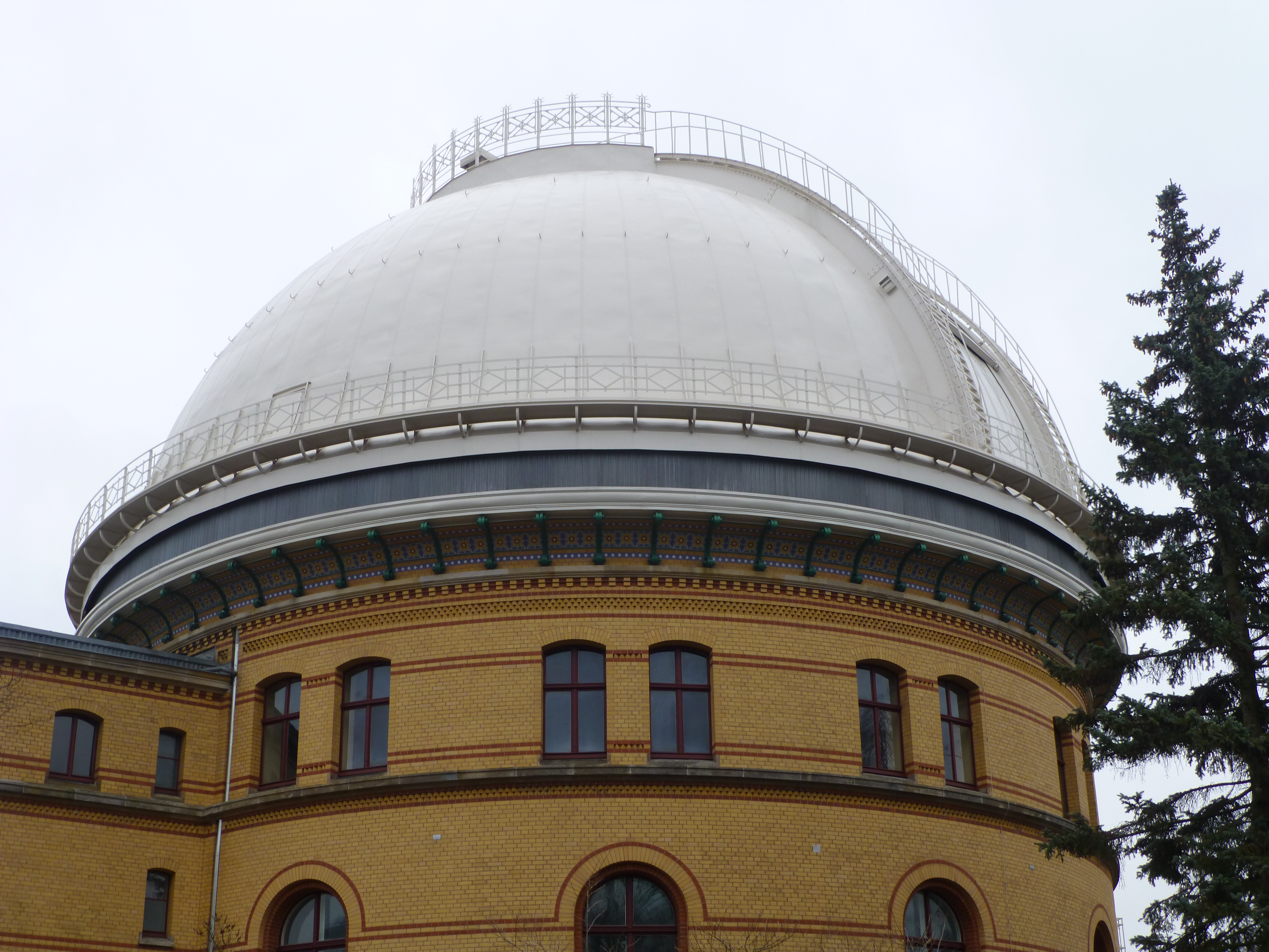 Großer Refraktor; Nahaufnahme